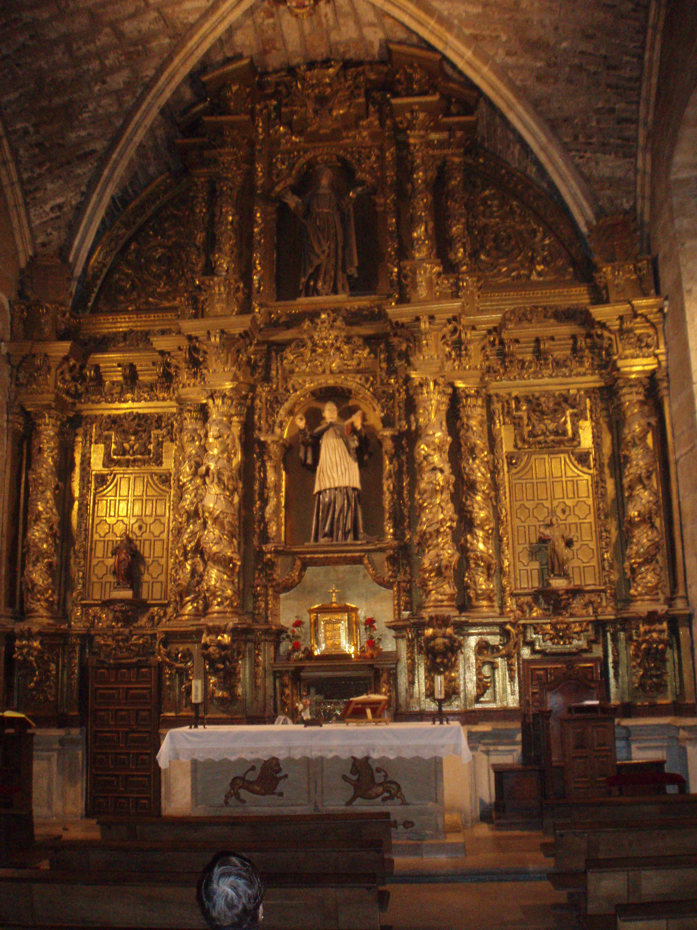 Retablo de Santo Martino--San Isidoro de León.